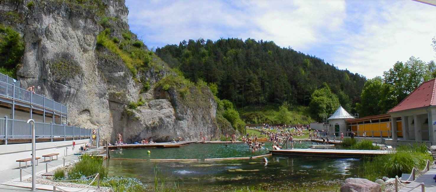 Blick vom Eingang des Pottensteiner Felsenbades in die Anlage